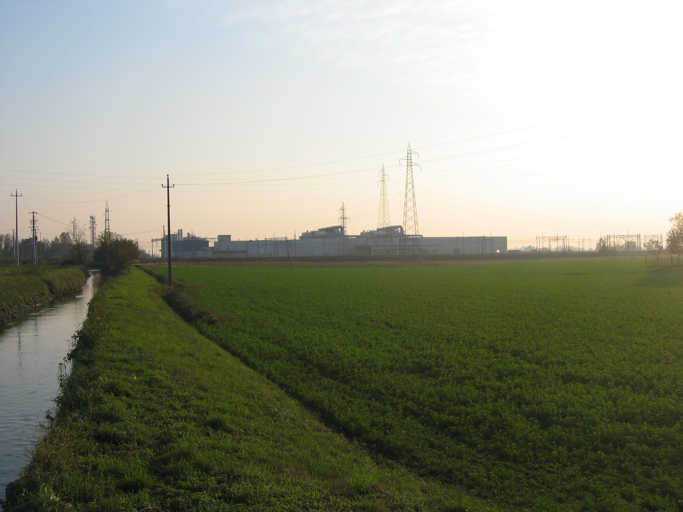 La tipografia Eruogravure vista dalla campagna